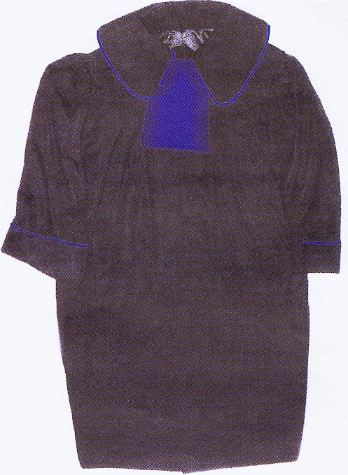 Przód togi radcy prawnego